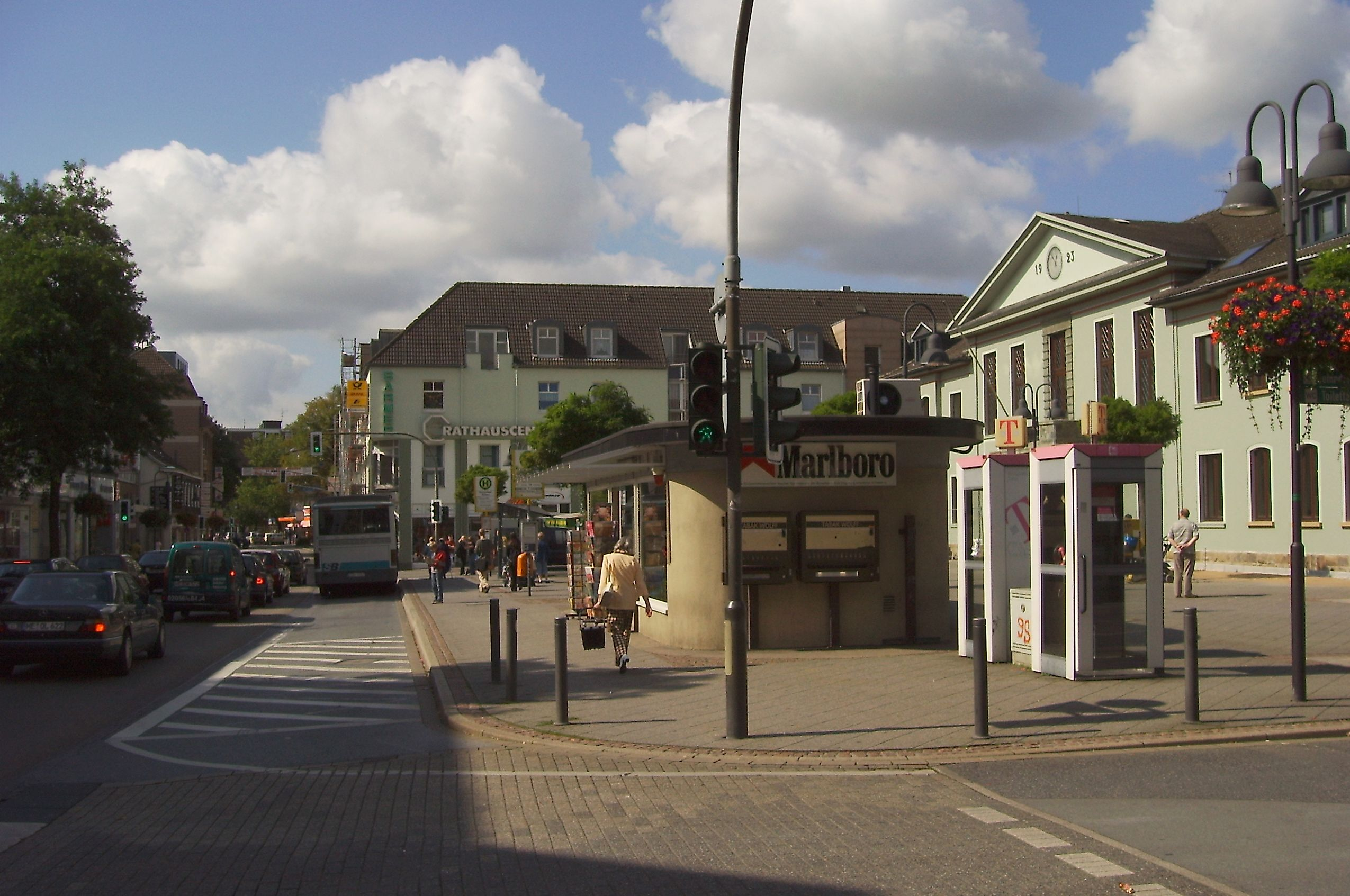 Heiligenhaus, Germany Hauptstraße, Rathaus